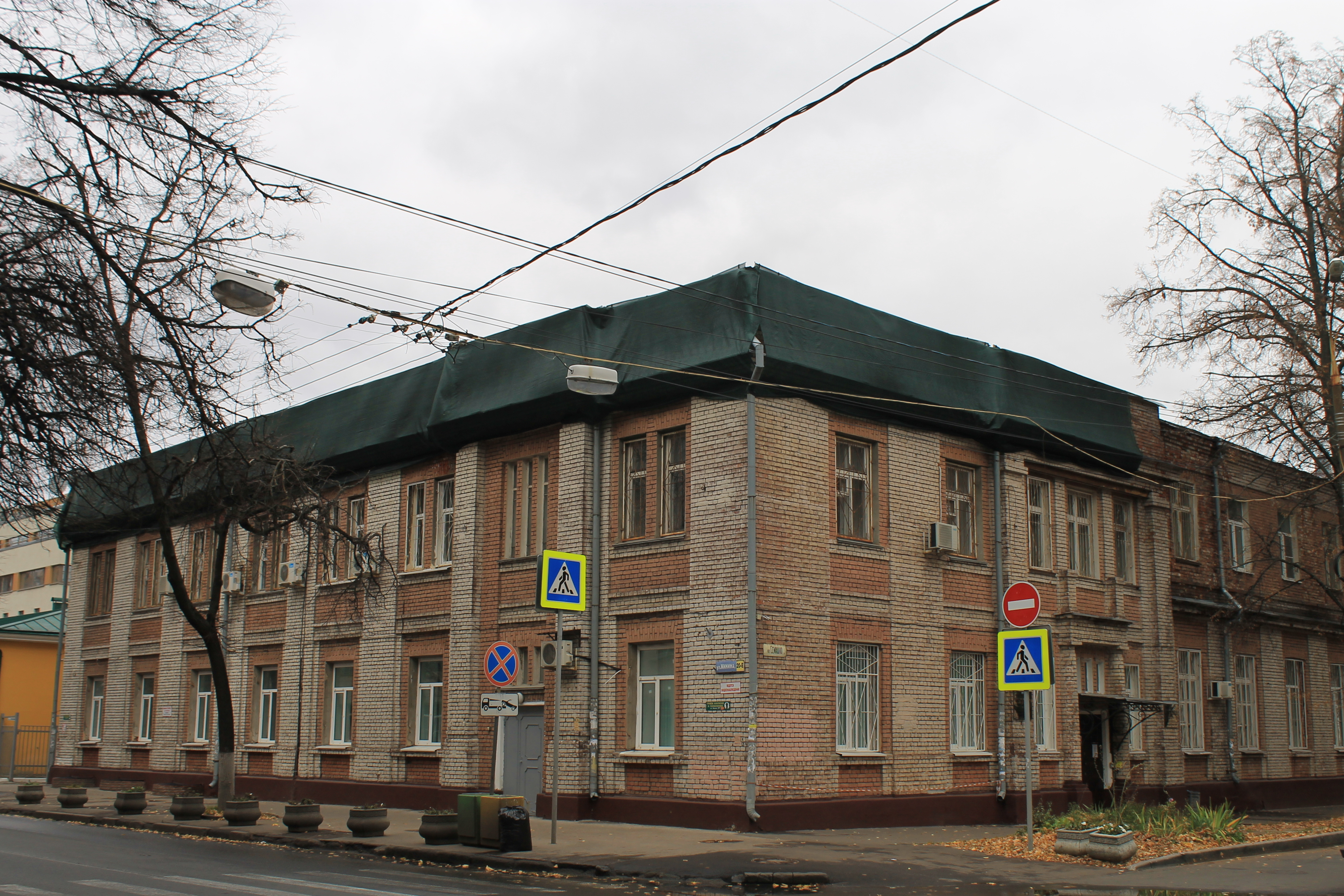 Амбулатория (наружный флигель): улица Минина, 20/3, литер Е, Нижний Новгород, Нижегородская область